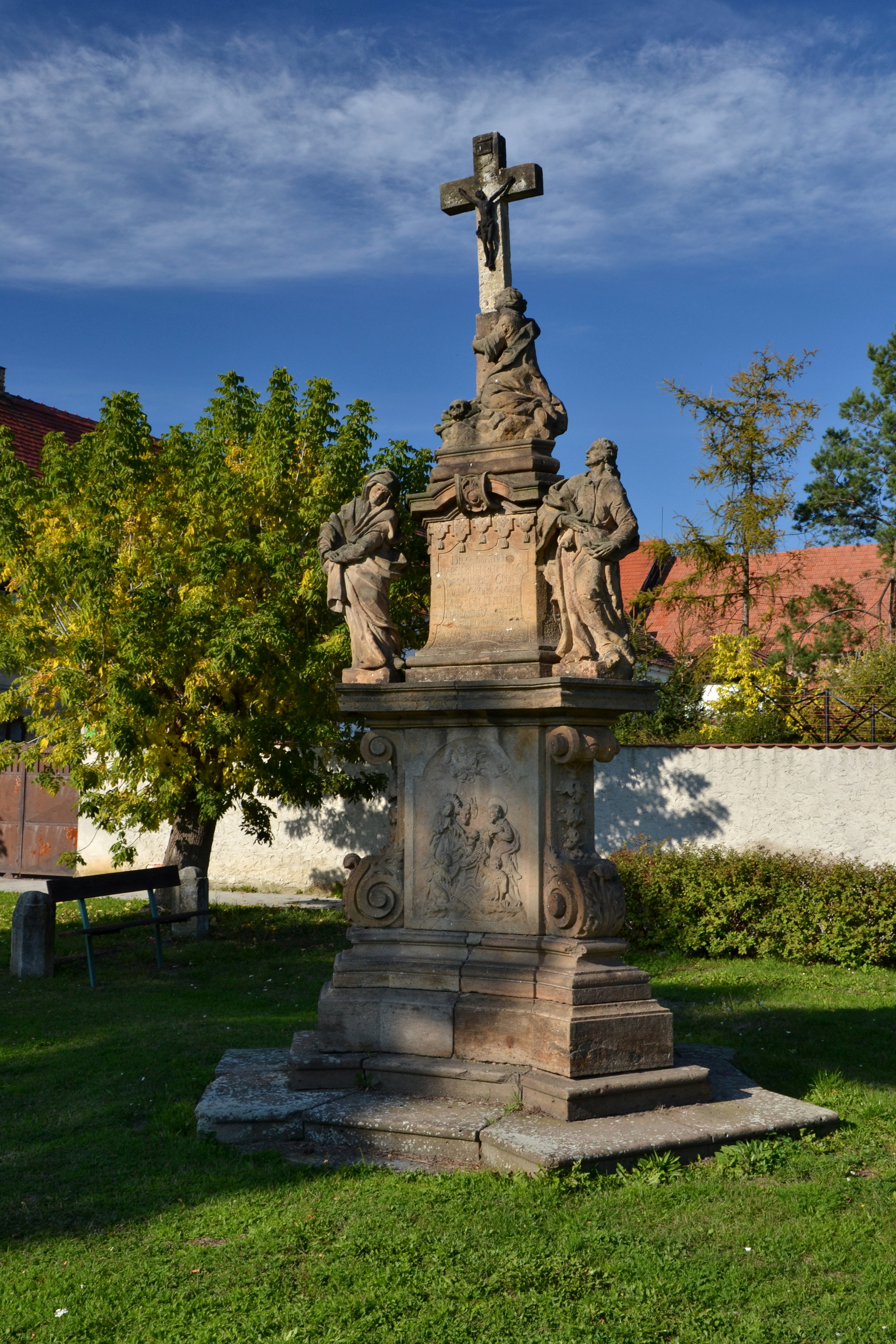 Sousoší - Kalvárie (Libědice), Libědice